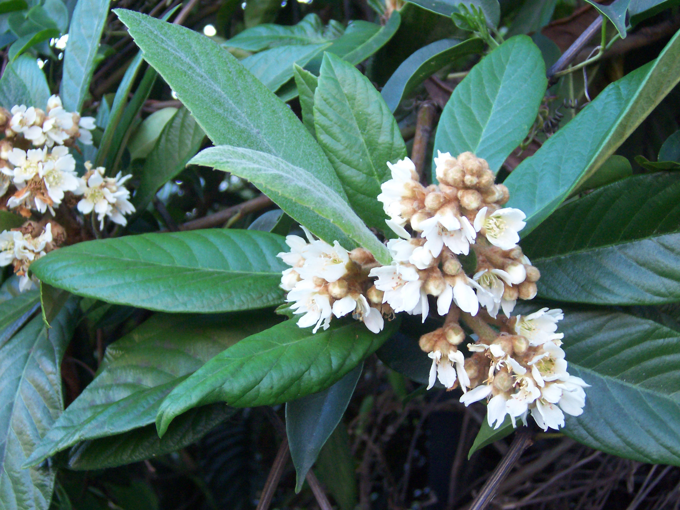 Eriobotrya japonica en : Loquat (flowers) fr : Néflier du Japon (fleurs) Photo : B.navez - MAR 2006 - Réunion island